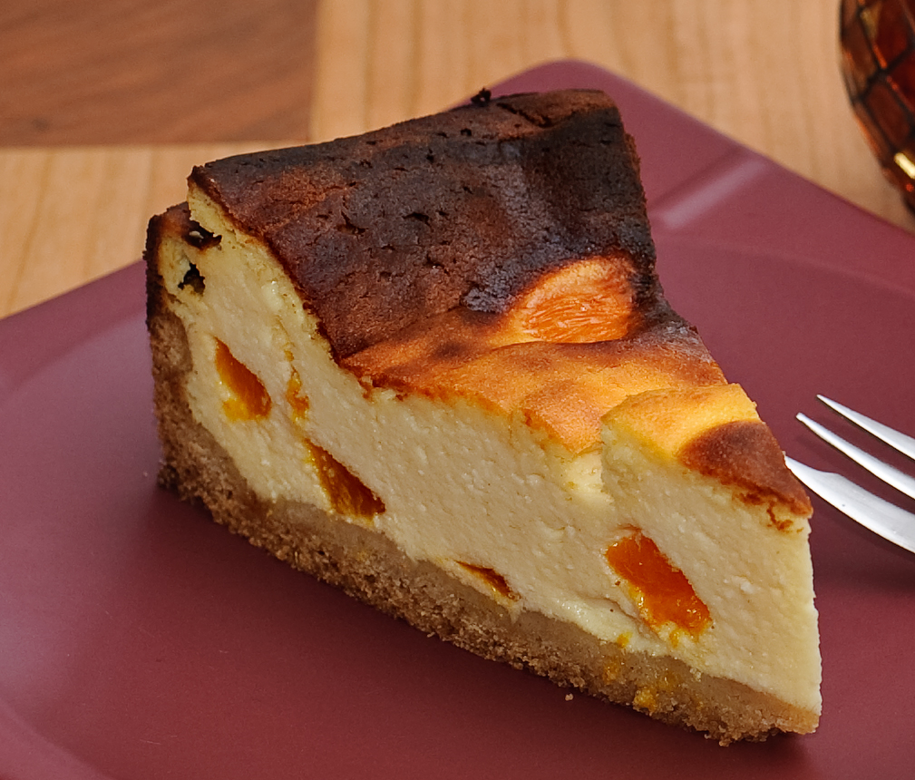 selbstgebacken, versteht sich :)